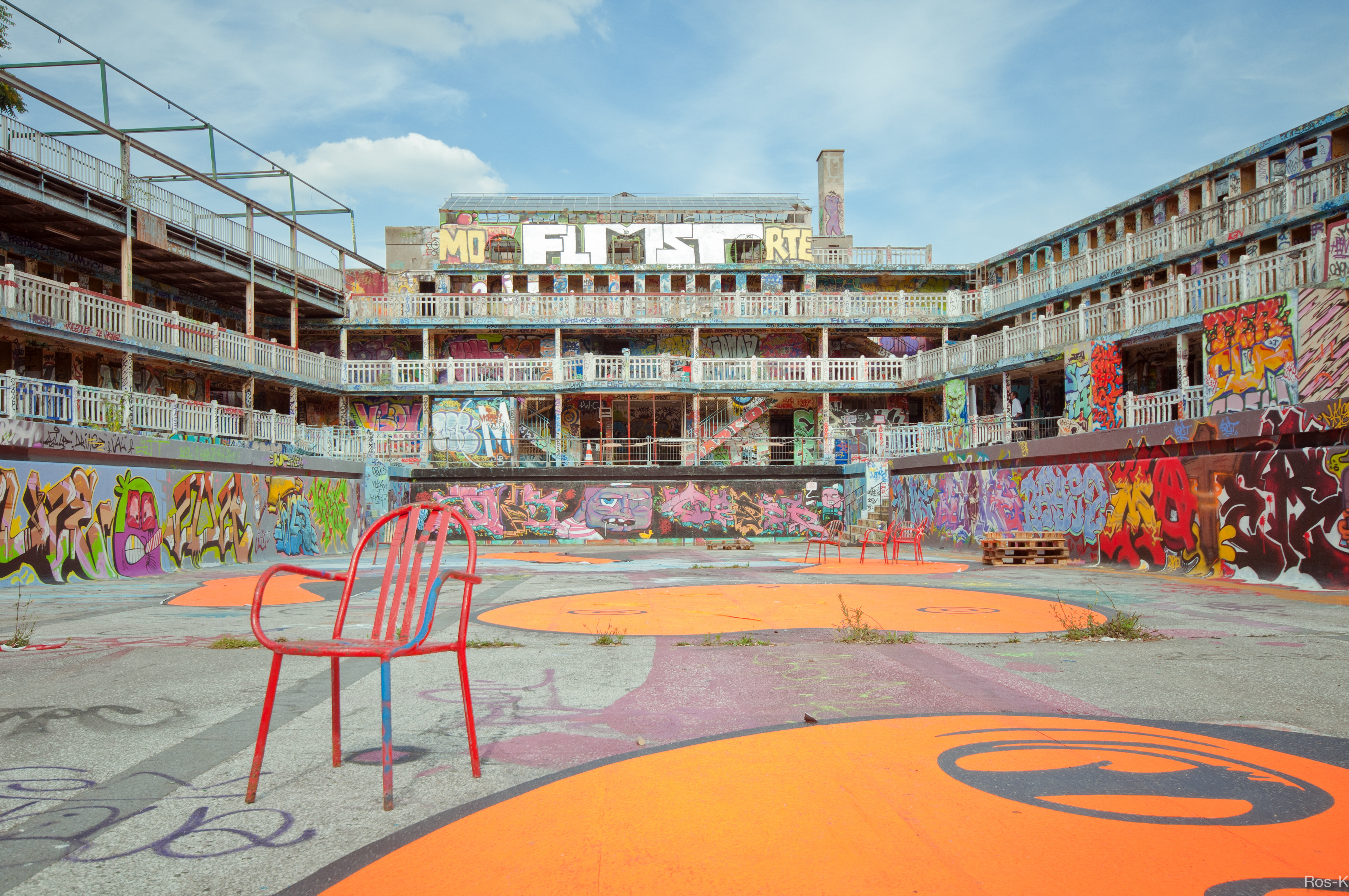 Piscine Molitor, Paris, France.